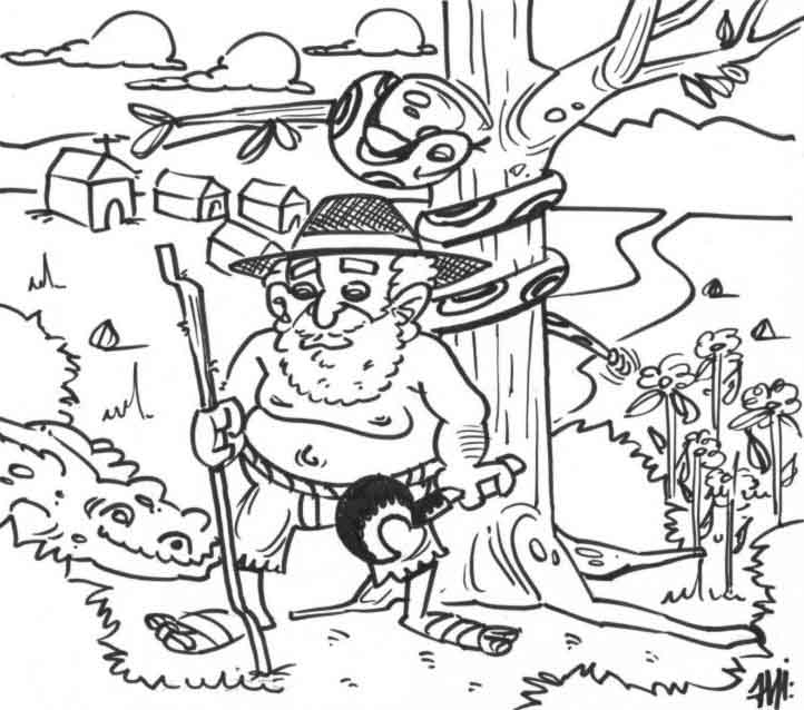 O mito do ermitão ou Judeu errante.